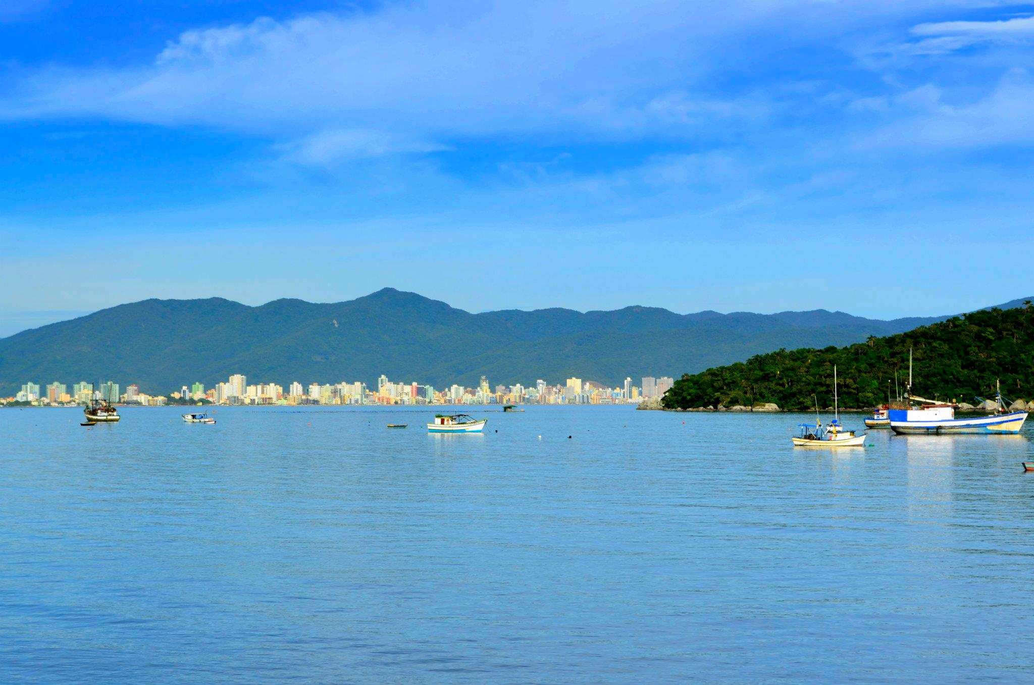 Ciudad de Itapema vista desde Porto Bello, Brasil